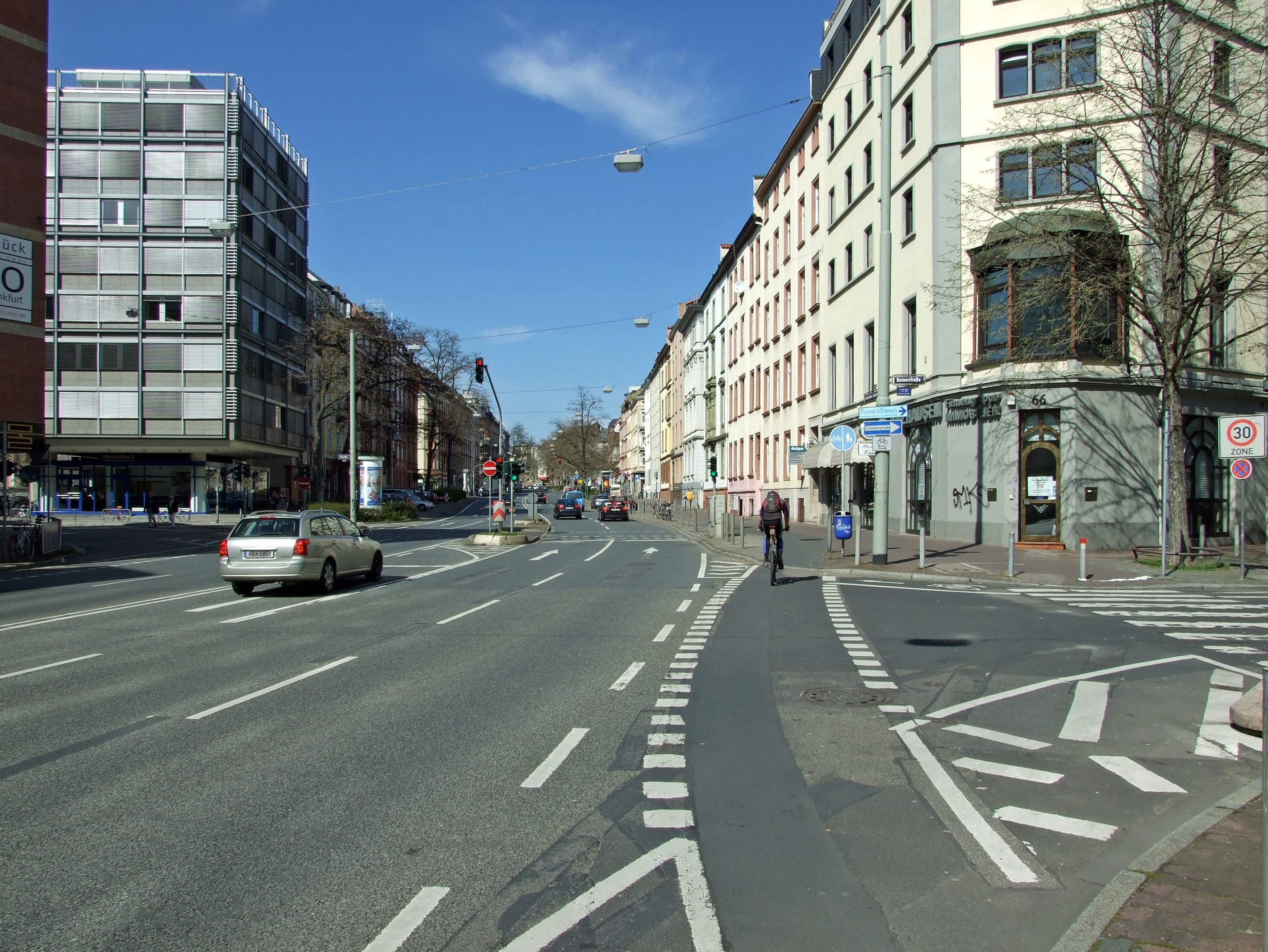 Eschersheumer Landstrasse, Ffm, ab Heinestrasse, Richtung (Nord) Holzhausenstrasse